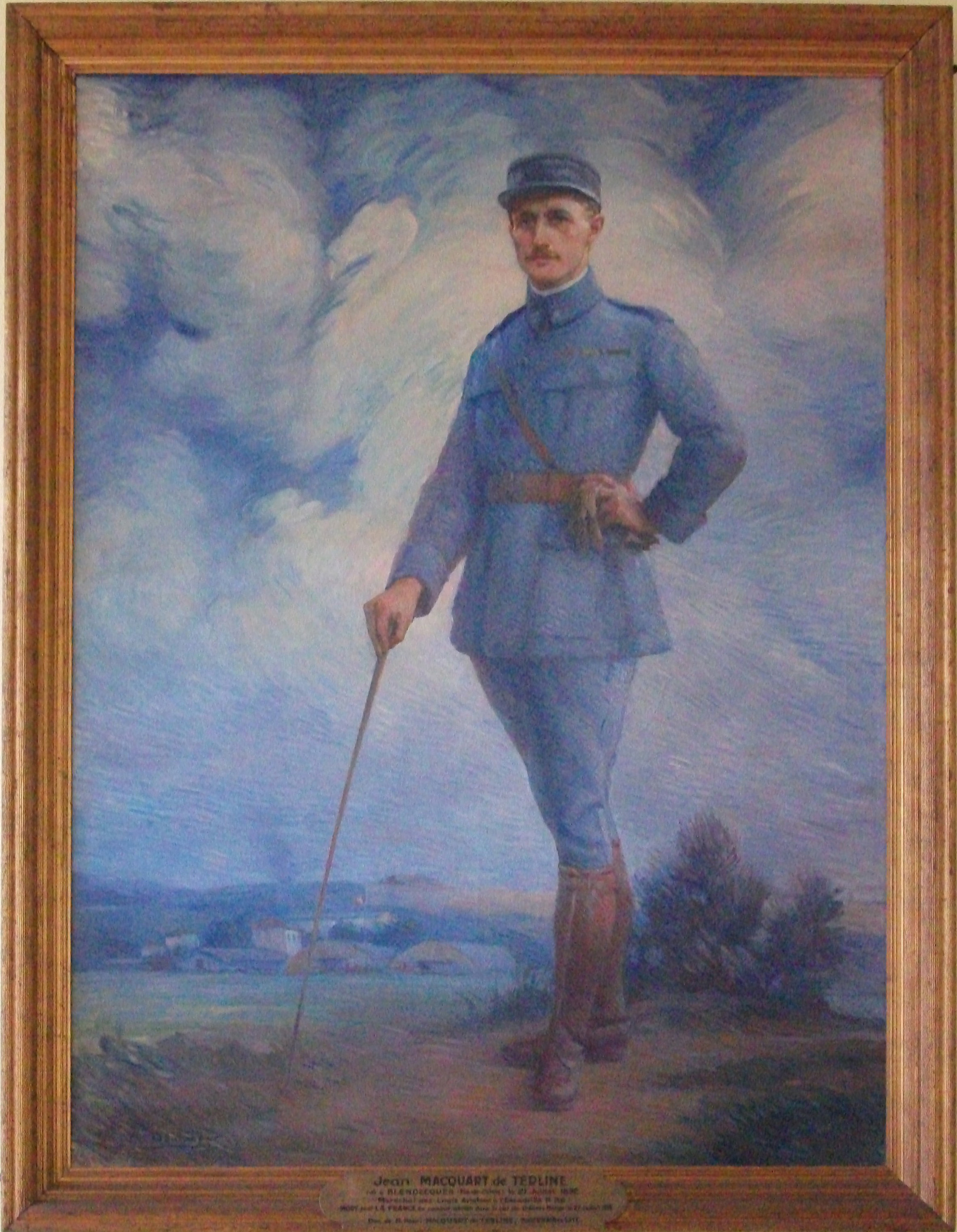 Jean Macquart_de_Terline par Boulanger, tableau se trouvant en une salle du rez-de-chaussée de la Mairie.